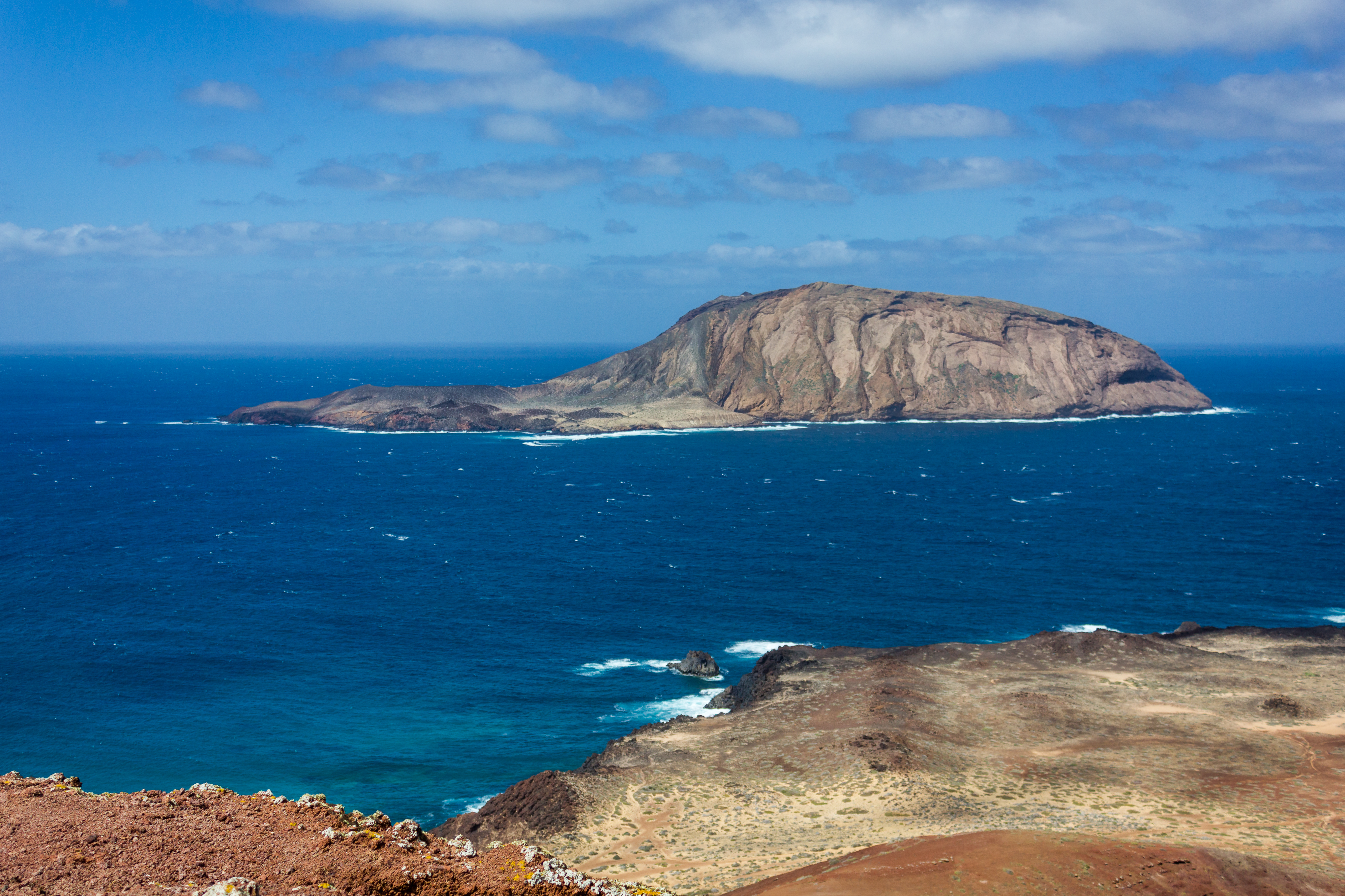 Vista del islote de Montaña Clara desde Montaña Bermeja en la isla de La Graciosa. Montaña Clara es parte de la reserva natural integral de Los Islotes This is a photography of a Site of Community Importance in Spain with the ID: ES7010044. Natura2000 entry, EEA entry